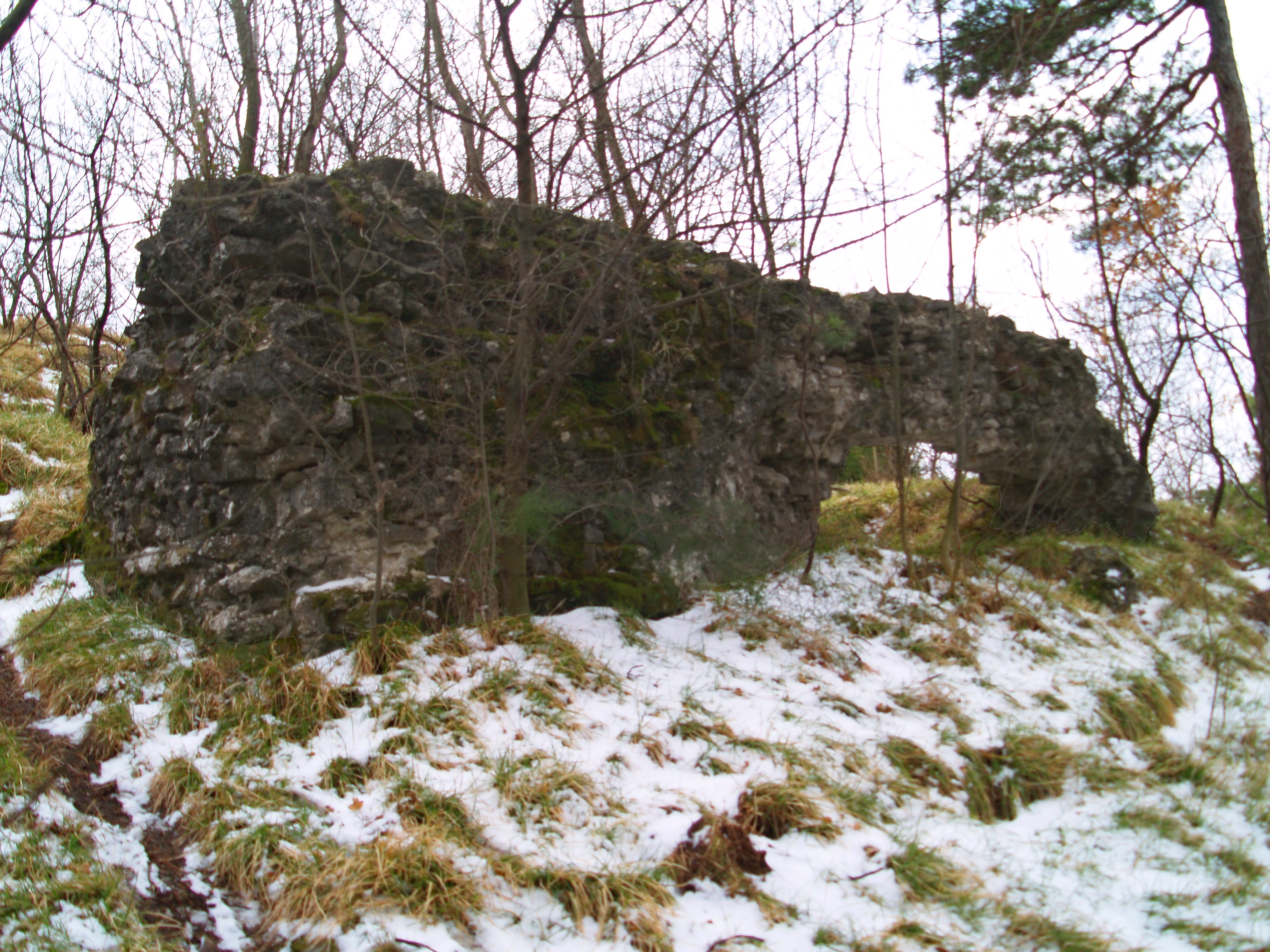 Detajl ostankov Muhovega gradu, verjetno beneška cisterna iz 14. stoletja.